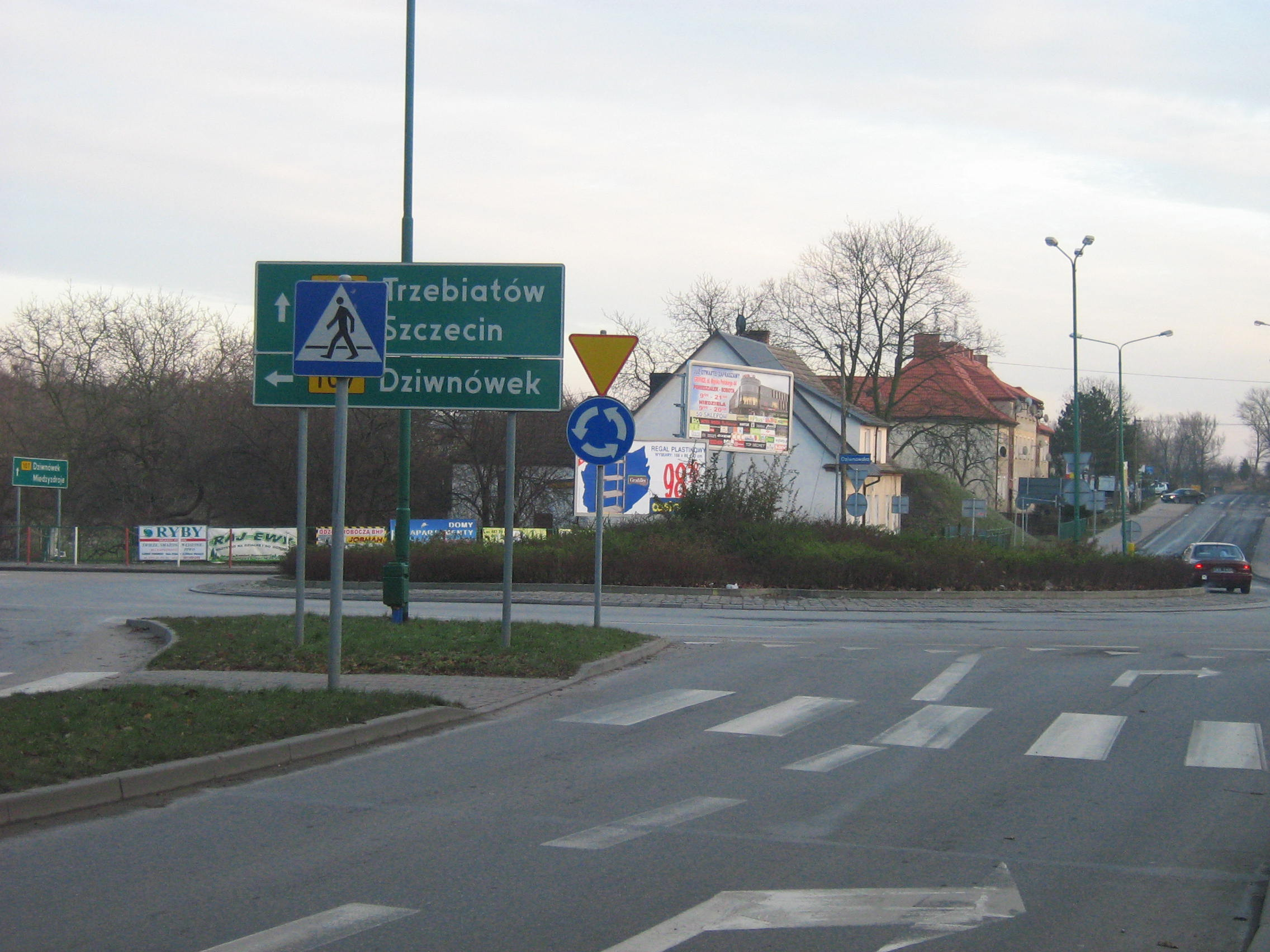 Droga wojewódzka nr 107 w Kamieniu Pomorskim. Widok w kierunku Dziwnówka.